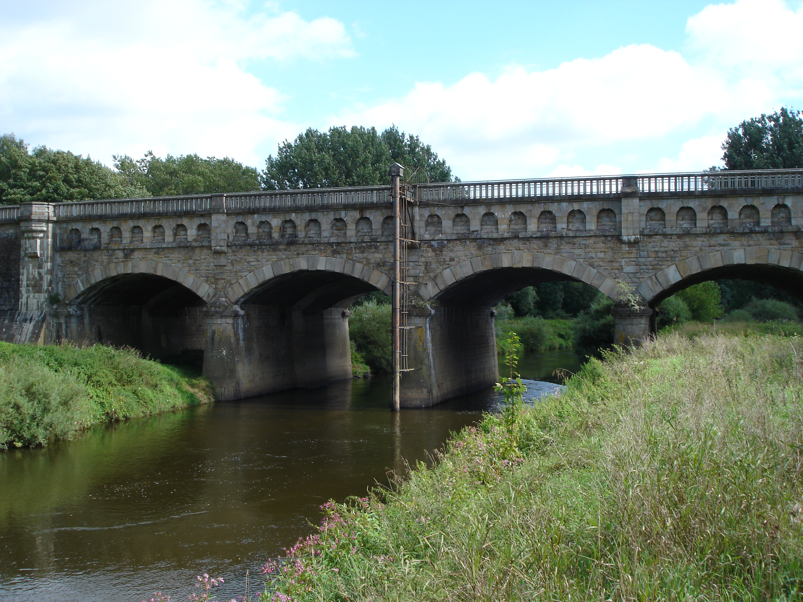 Die Kanalüberführung bei Münster-Gelmer, Westfalen, Deutschland: Panorama der Nordseite